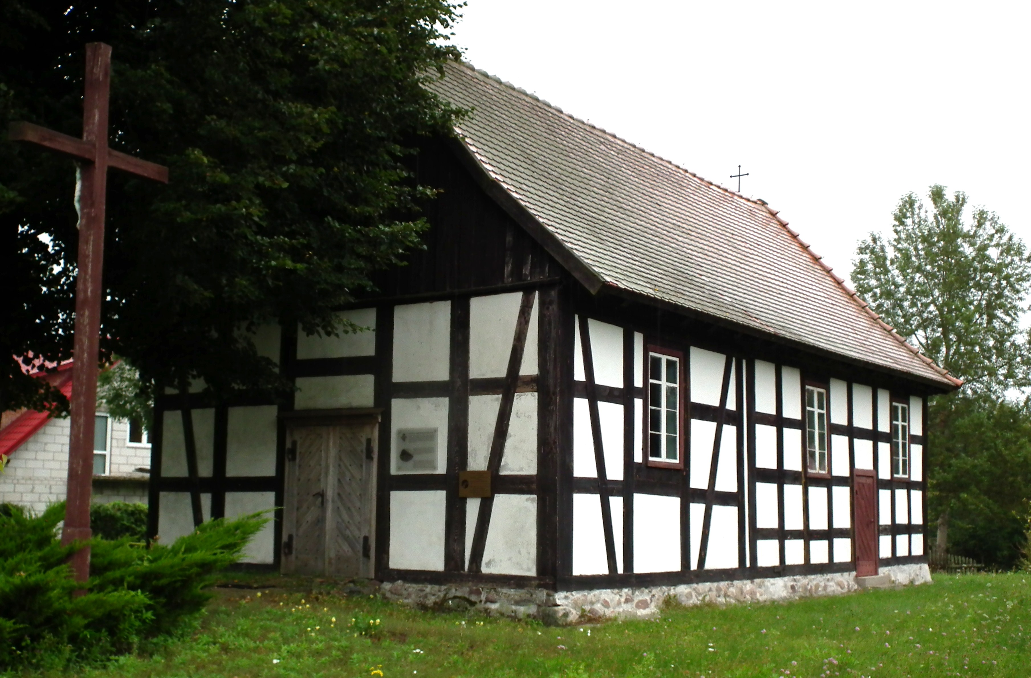 Kościół MB Różańcowej w Martwi k/Tuczna.